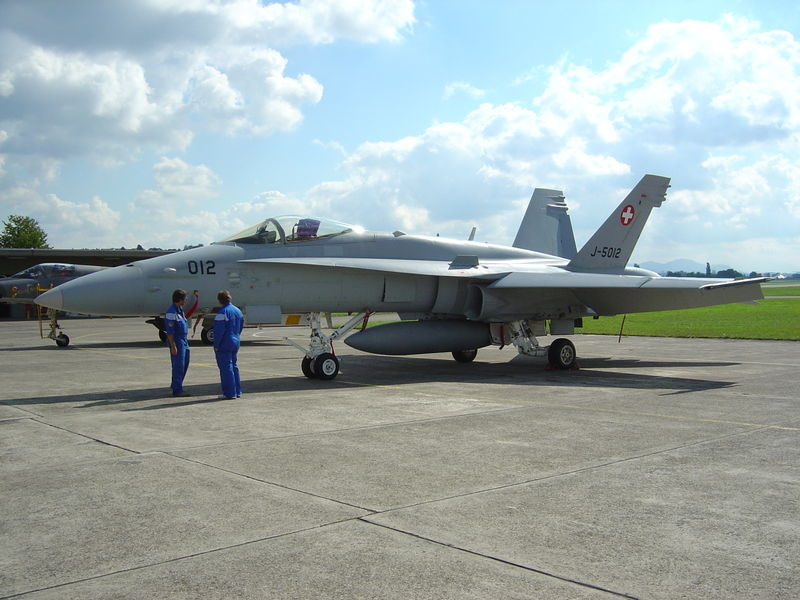 Militaviadila FA18 de la svisa armeo sur la Armeflughaveno Dübendorf La dosiero estas kopiita el la germana Vikipedio, kie ĝi estas publikigita laŭ la kondiĉoj de la GFDL-permesilo de GNU 1.2.